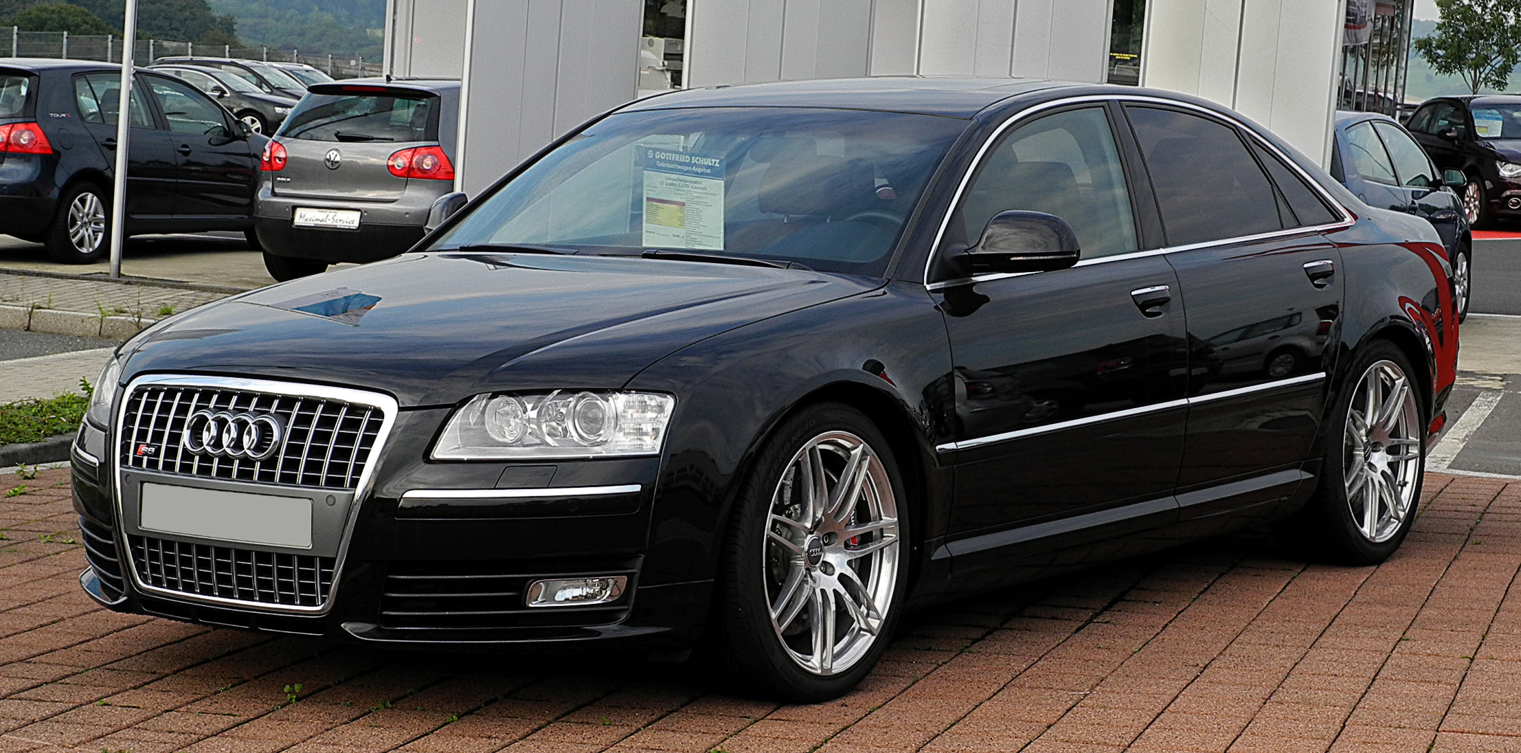 Audi S8 (D3, 2. Facelift)